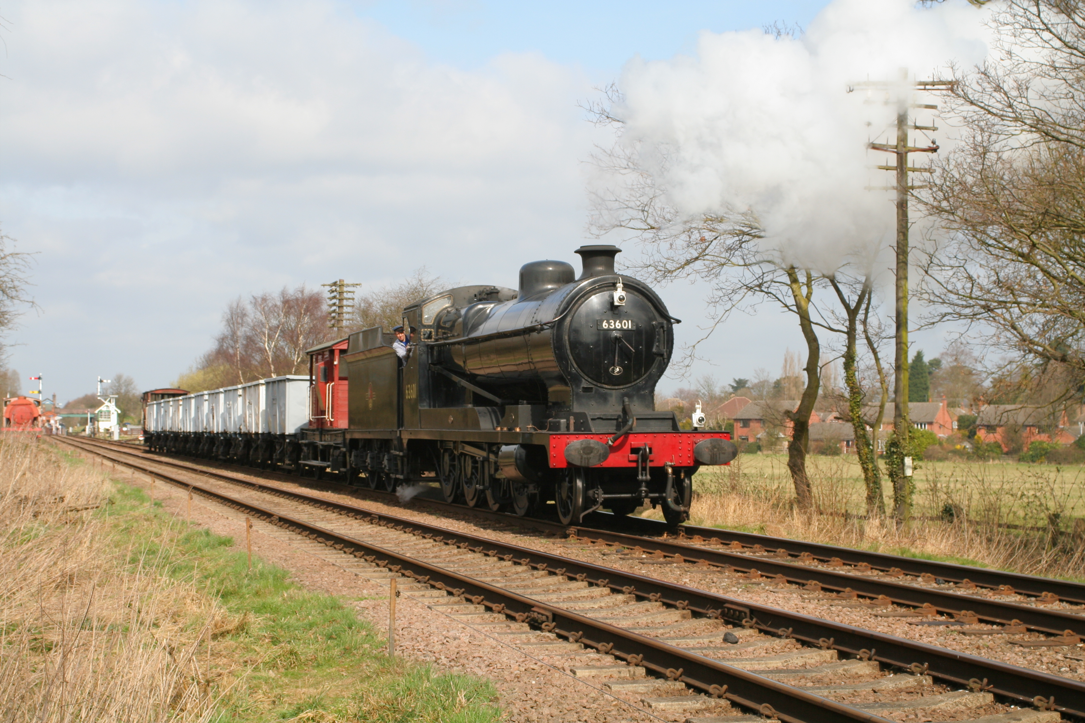 63601 windcutter